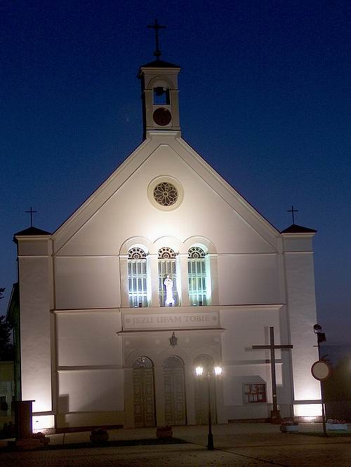 Heiliggeist-Kirche.